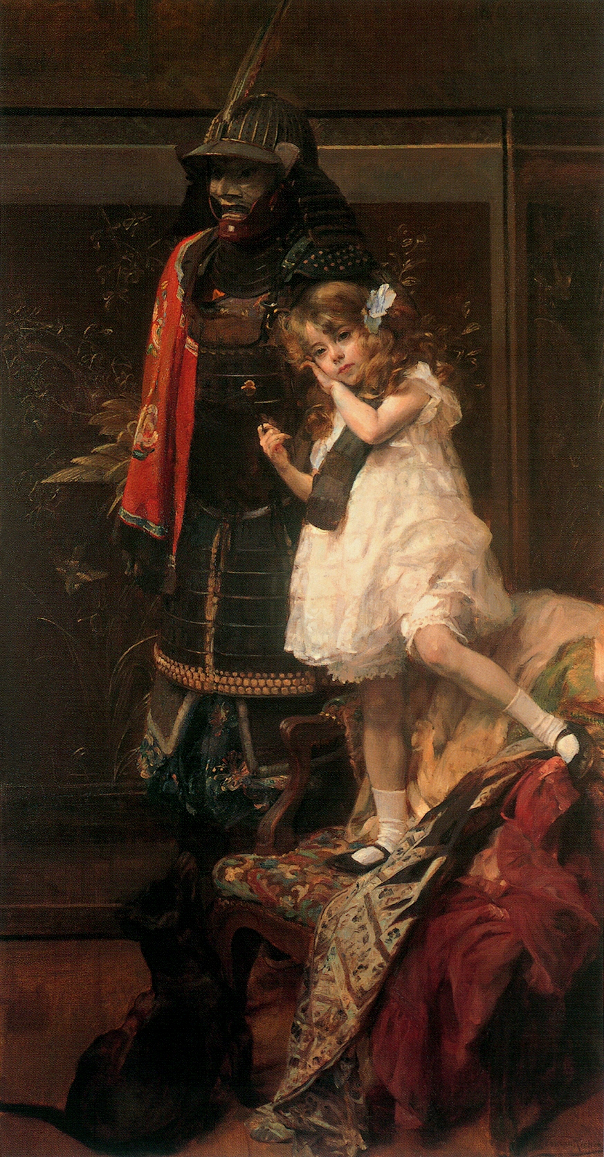 Une fillette (Cécile Richir), un mannequin en armure de samouraï et un chien